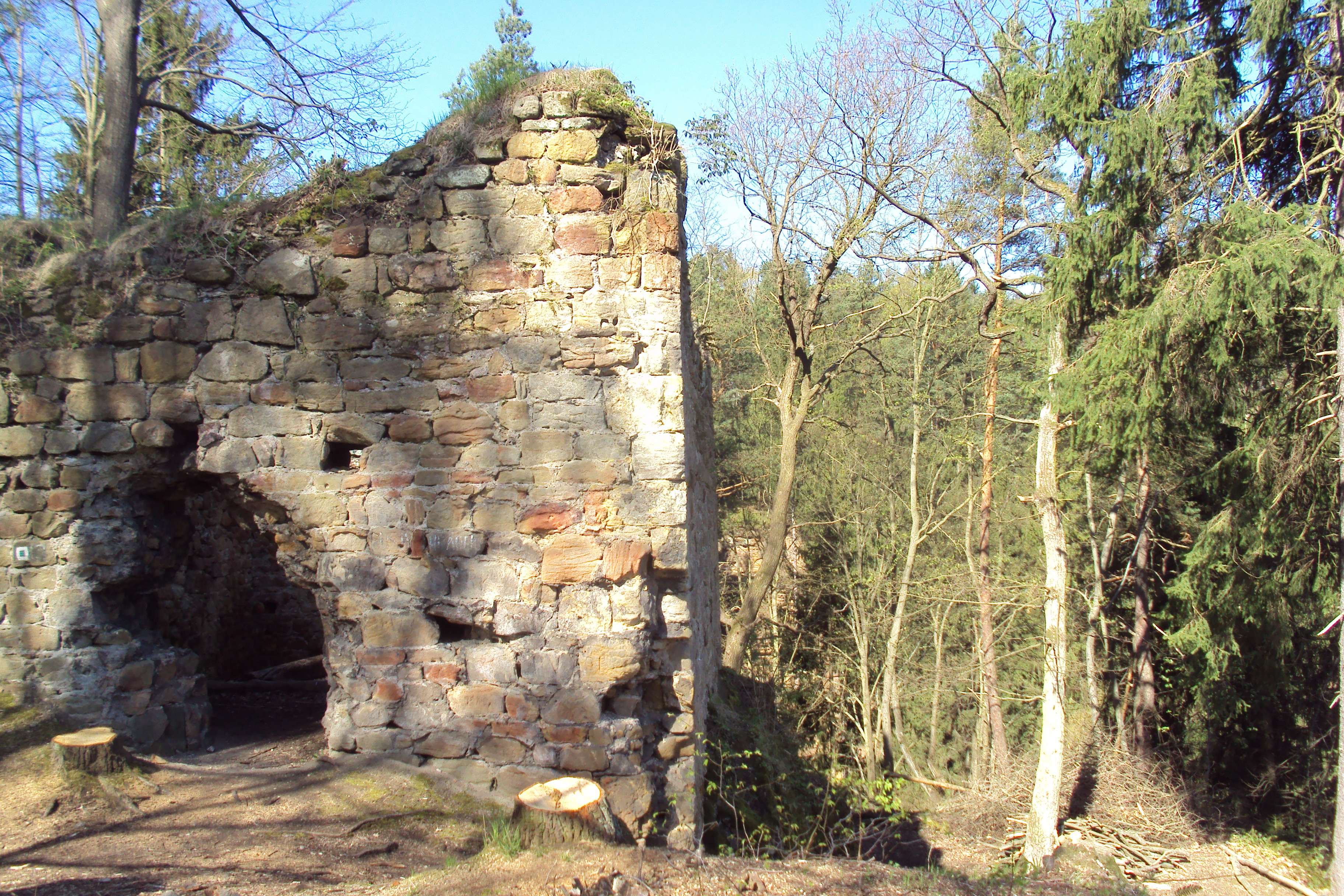 Ruina hrádku nad údolím Dolského potoka, mezi Holany a Dřevčicemi